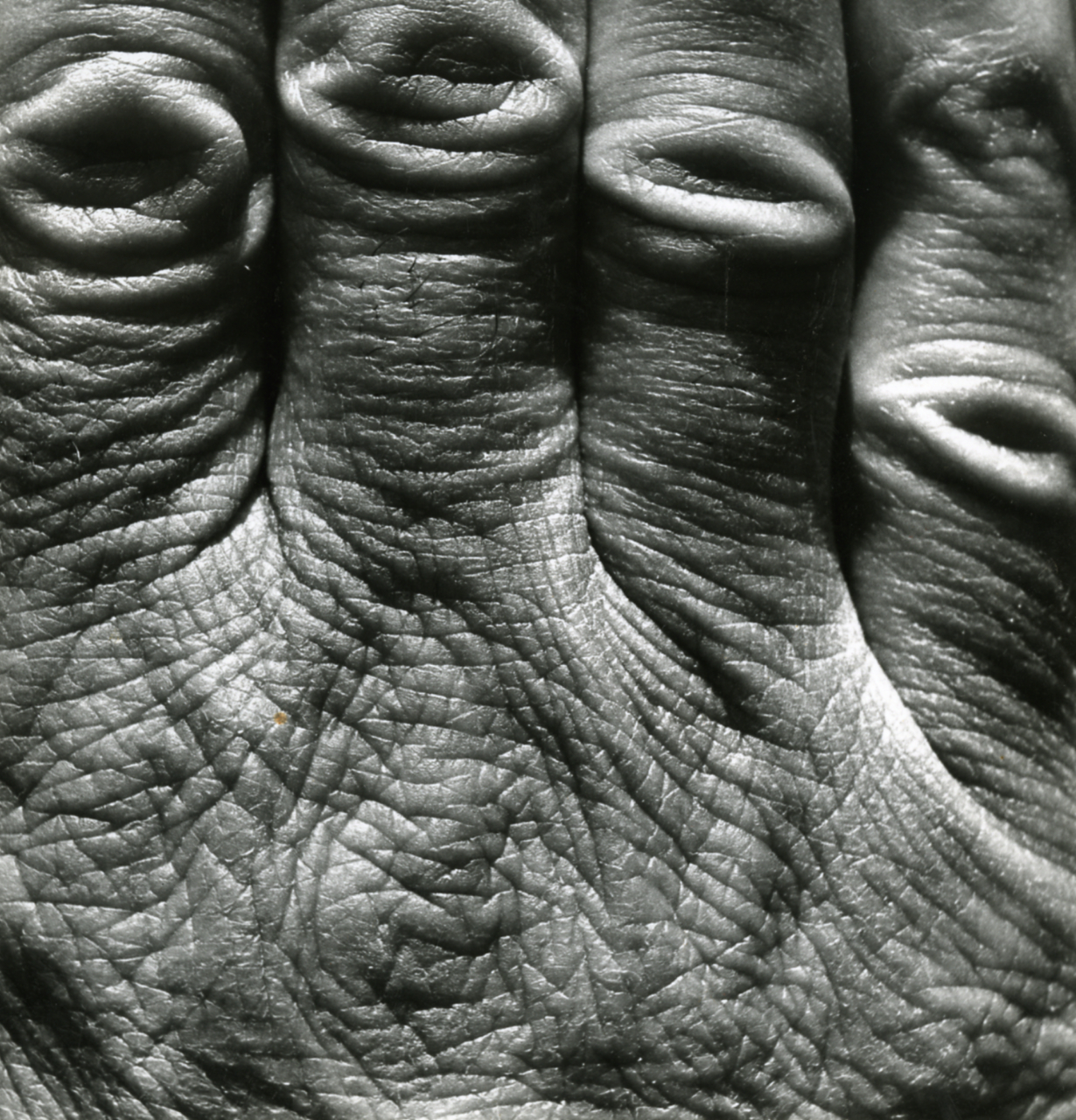 Mani. Il segno degli anni. I segni del tempo. Serie fotografica : Italia, 1970 / Paolo Monti. - Stampe: 2 : Positivo b/n, gelatina bromuro d'argento/ carta, 17x18. - ((Al verso delle stampe iscrizioni didascaliche e documentarie (date) manoscritte a matita: "Il segno degli anni/ 1968", "I segni del tempo/ 1970"; timbro a inchiostro con copyright: "© Copyright/ Credit to/ Paolo Monti/ Corso Sempione [...]/ Milano". - Sul coperchio della scatola iscrizione didascalica manoscritta a pennarello nero: "Ritratti/ bambini - Monti/ Part. corpo".